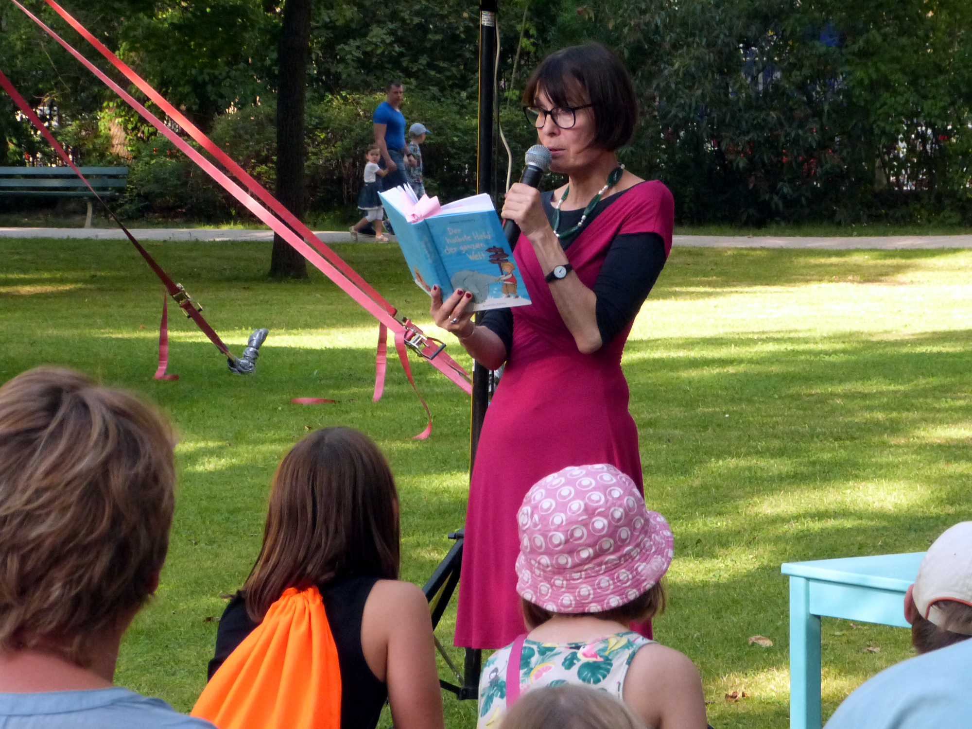 Die Schriftstellerin Andrea Schomburg bei einer Lesung auf dem Erlanger Poetenfest 2017.